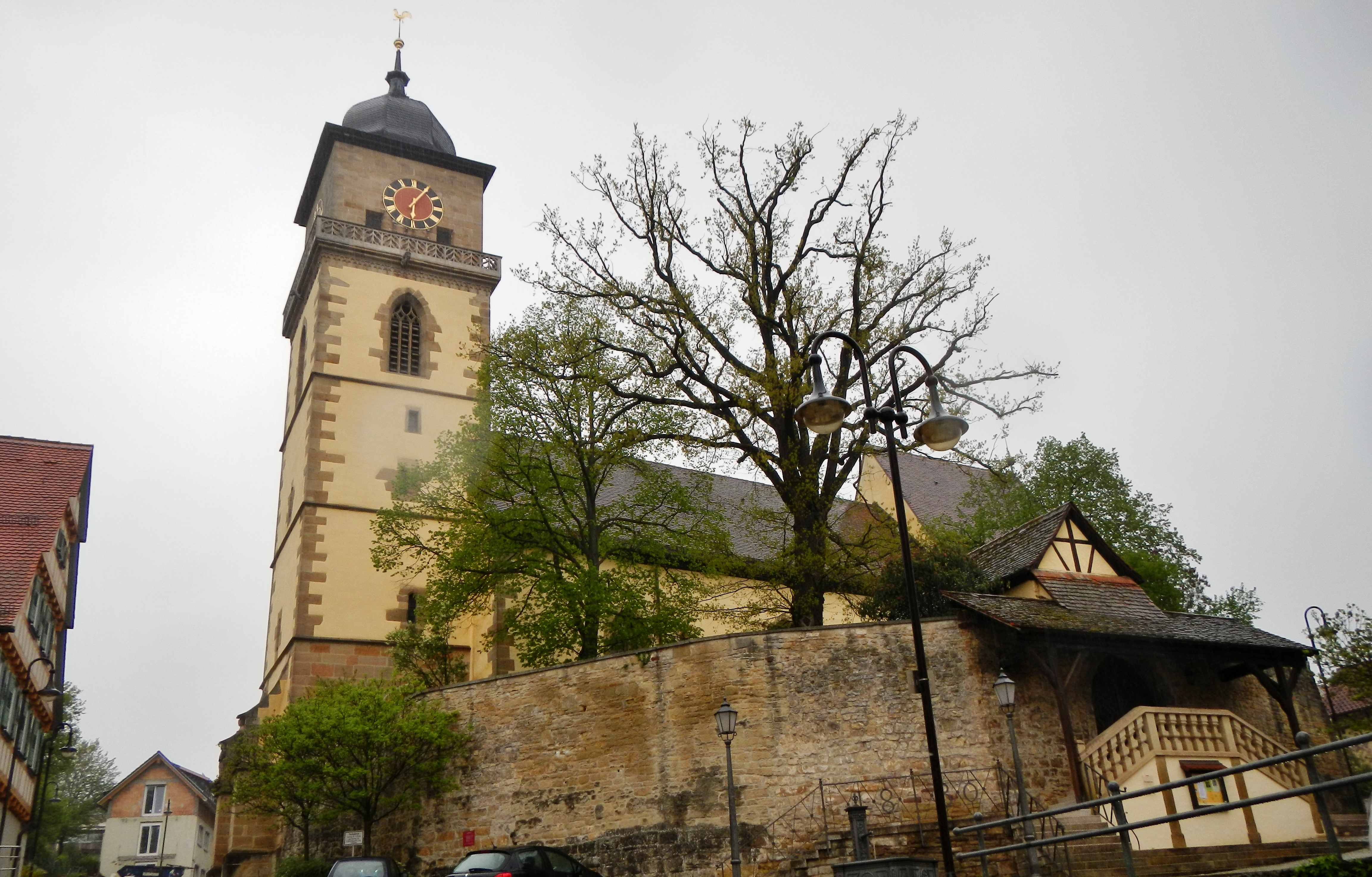 Georgskirche in Schwieberdingen, spätmittelalterliche Wehrkirche, 13. Jahrh.